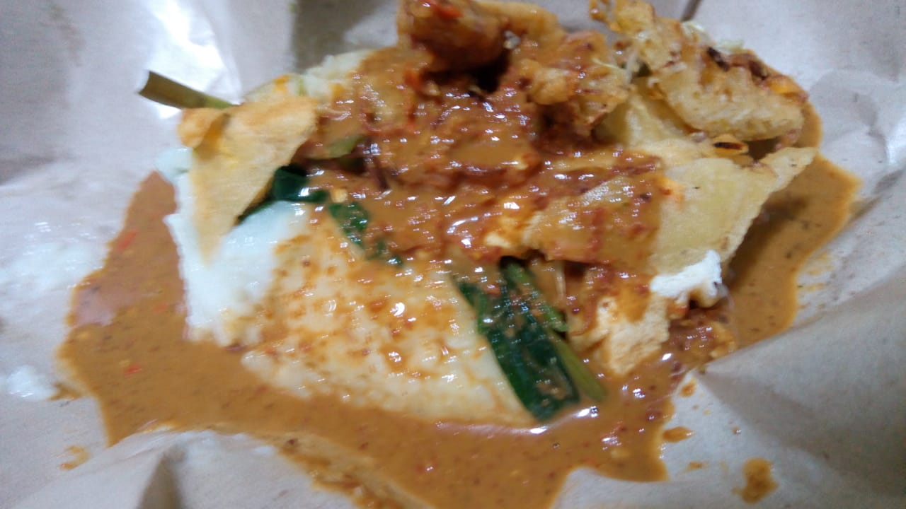 Tajin palappa